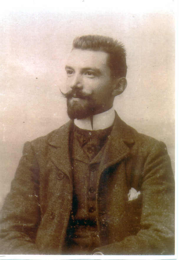 Gabriel van Dievoet, décorateur art nouveau.